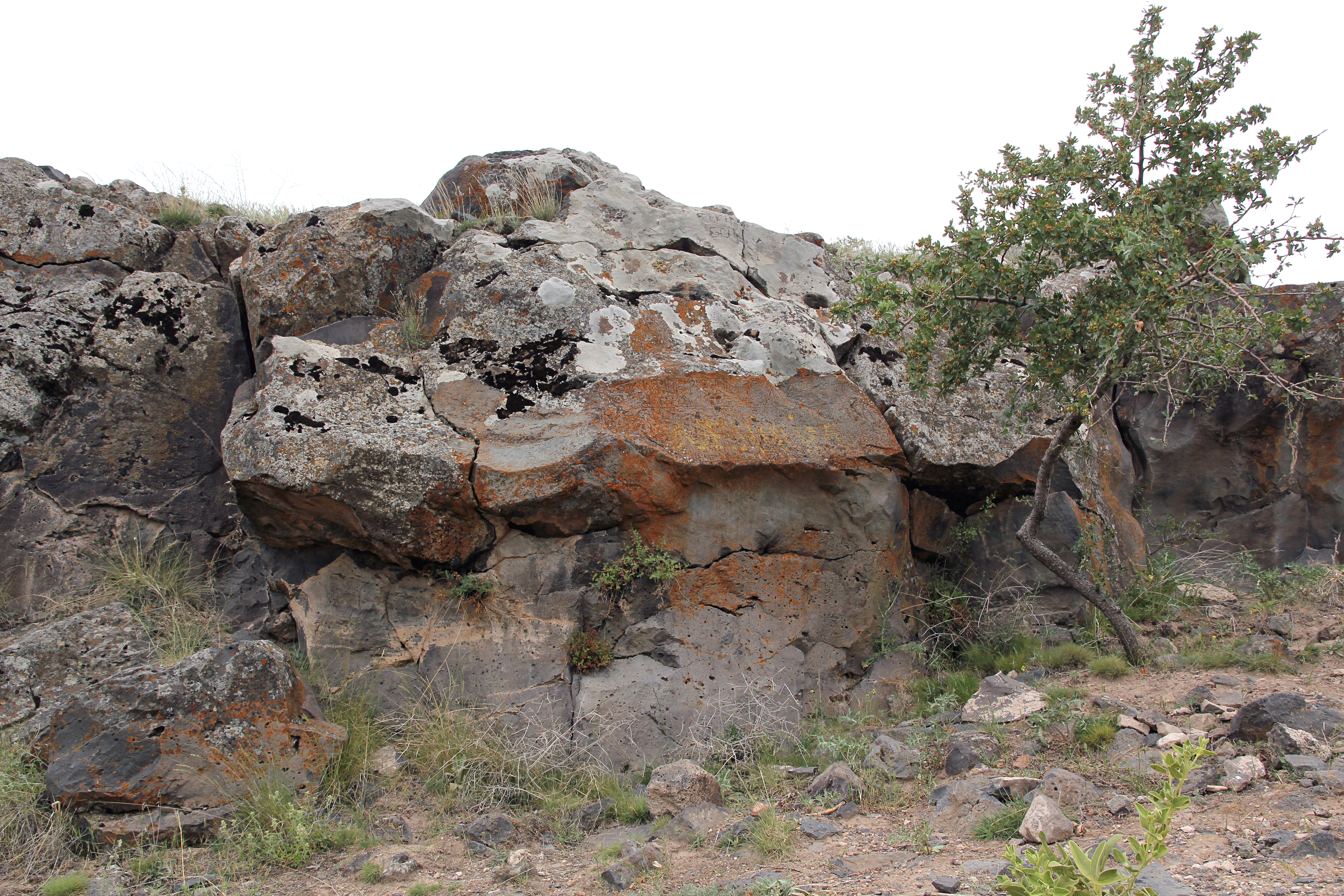 späthethitische Felsinschrift von Karaburna (Karaburun) nahe Hacıbektaş, Zentraltürkei, Ansicht von Osten